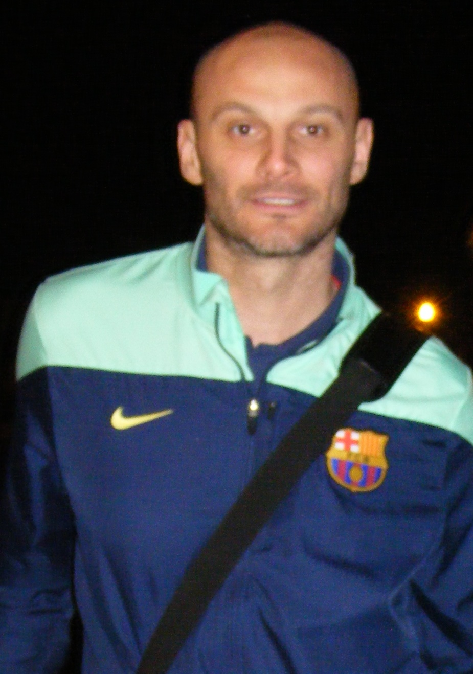 Danijel Šarić es un balonmanista bosnio